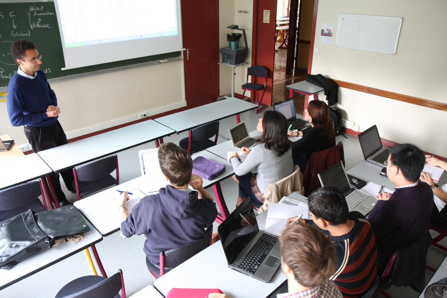 Campus de l'École polytechnique, cour aux élèves du Master 2 « Sciences et Technologies des Énergies Renouvelables » par Joaquim Nassar, dans une petite classe (PC).